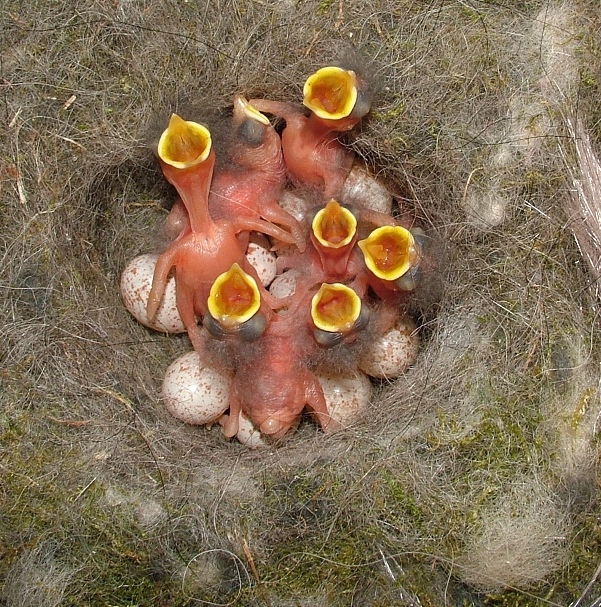 Česky: Líhnoucí se sýkory